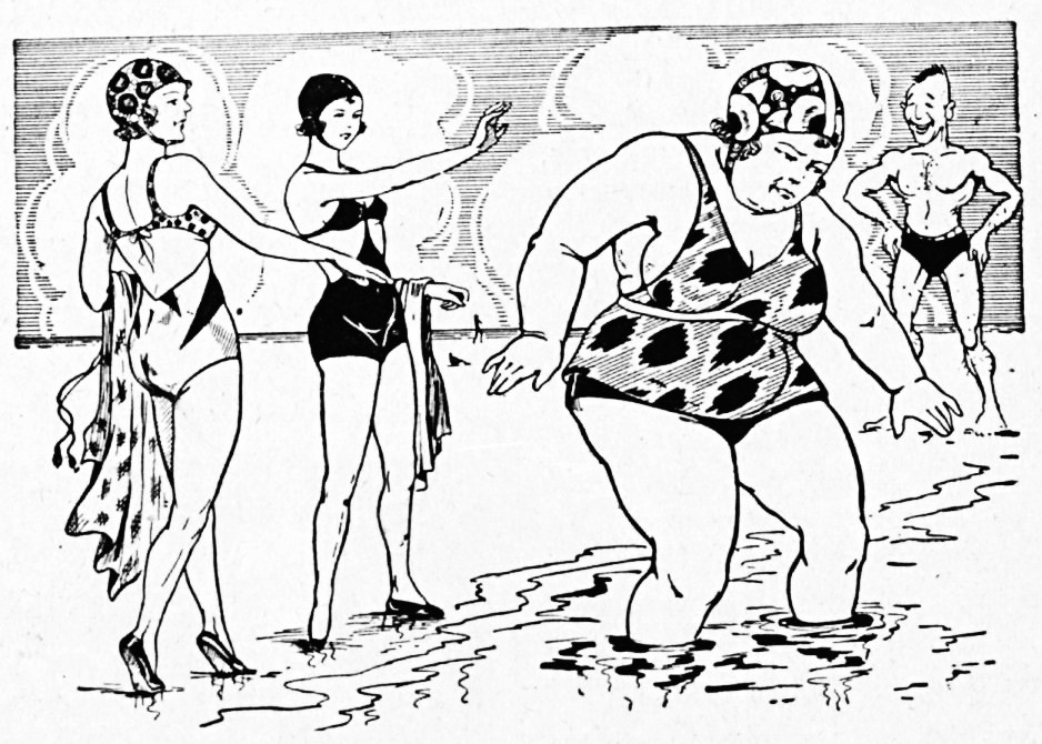 Bullying numa propaganda de remédio brasileiro, em 1942. Trazia, a imagem, o seguinte texto "informativo" (onde se conservou a grafia e eventuais erros originais da época): "As pessôas excessivamente gordas podem ser consideradas fóra não das de Hygiéa, a festejada rainha da medicina na Mitologia grega, como do codigo moderno do Belo aplicado à Arte. E a advertencia constante, a respeito desta má situação, se faz sentir nas ruas, no auto-onibus, nas praias de banho, por toda parte, enfim, às vitimas de olhares indiscretos, ironicos, e até de comentarios mordazes dos que se divertem com os males alheios. A gordura morbida acarreta ainda disturbios graves em todas as funções importantes do organismo: a respiração, a circulação, o regime de trocas organicas, etc., ficam seriamente comprometidos. Valha, porêm, a atividade frutuosa da Ciencia que apresenta aos martires da adiposidade, o generoso Leanogin, composto de estratos glandulares, essencias de algas marinhas e de vegetais terrestres, que exerce ação eficiente na extinção da gordura patologica e normaliza a distribuição equitativa dos tecidos gordurosos. Distribue-se literatura elucidativa e vende-se este produto nas principais drogarias. Saibam quantos se encontram sob o infortunio da gordura, que Leanogin dá ao corpo, permanentemente, saude, graça e beleza."